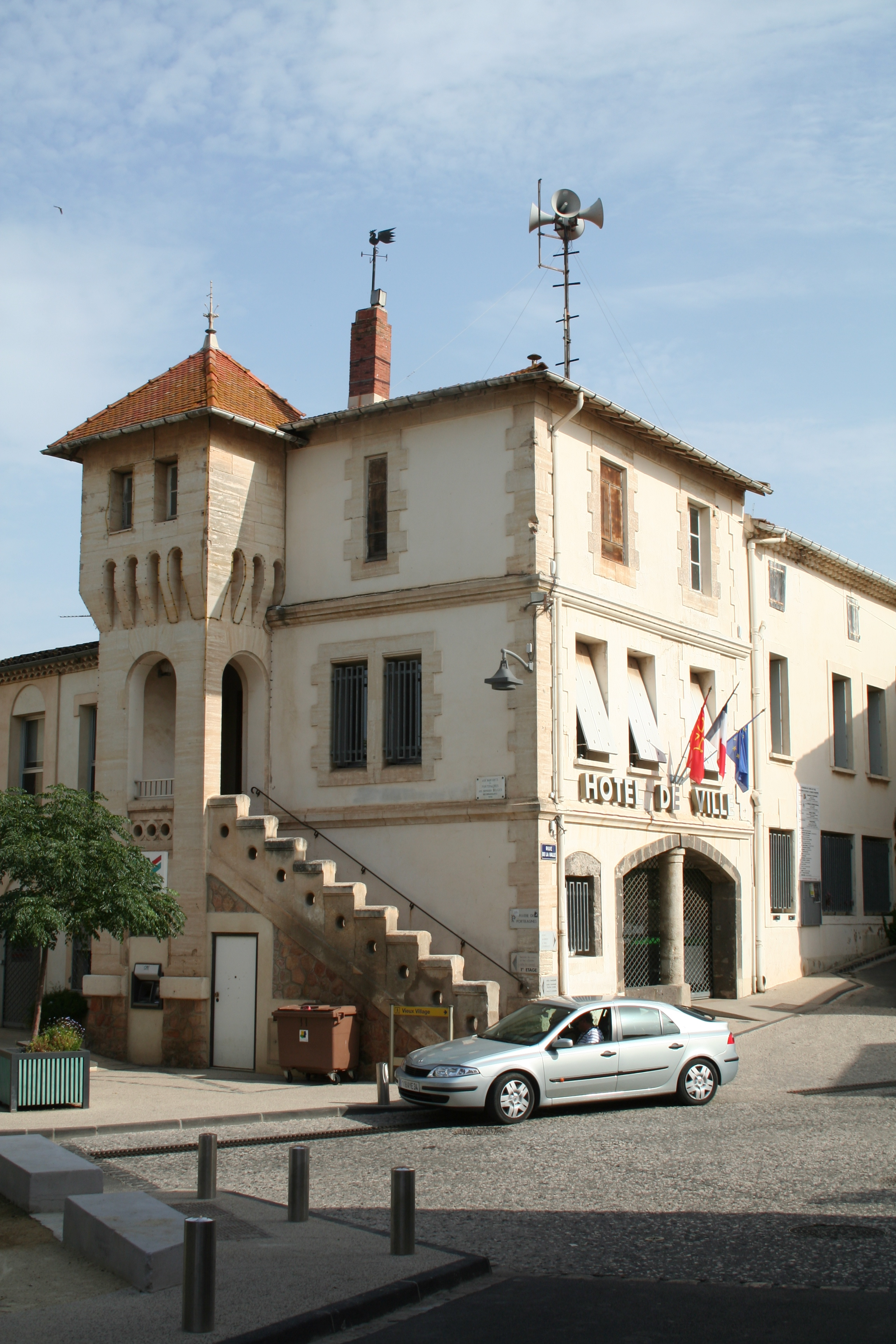 Portiragnes (Hérault) - Mairie.